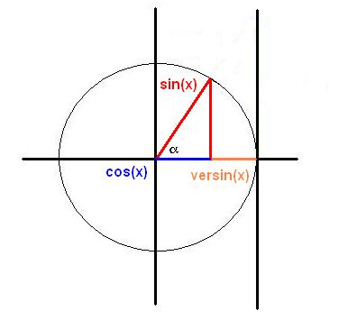 Eigen maak